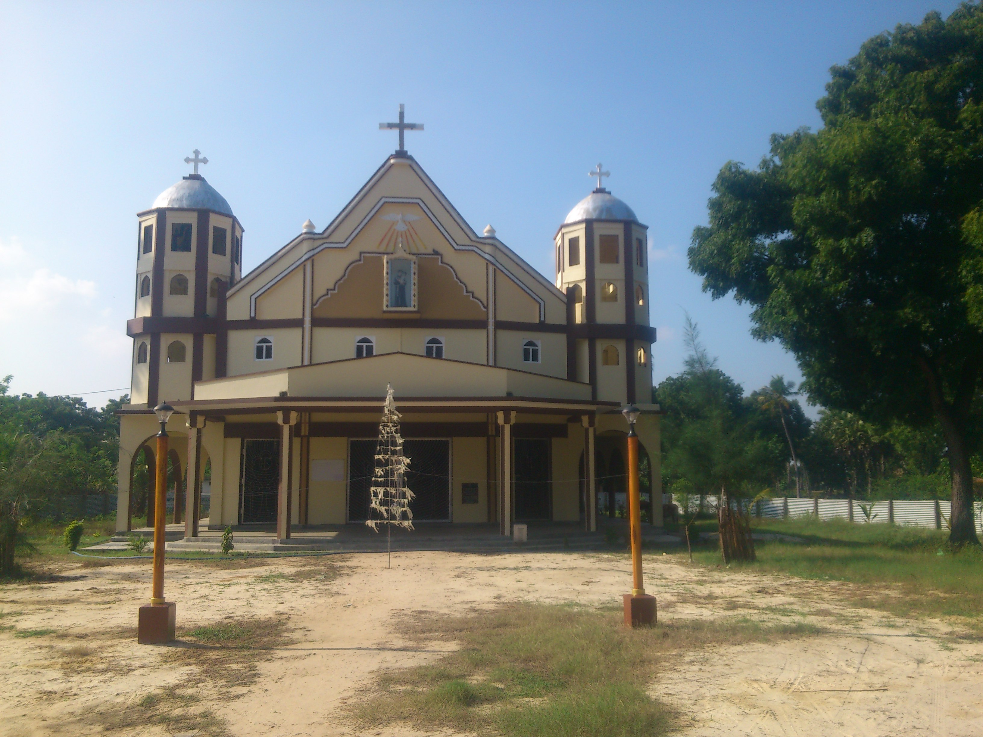 புனித அந்தோனியார் தேவாலயம்